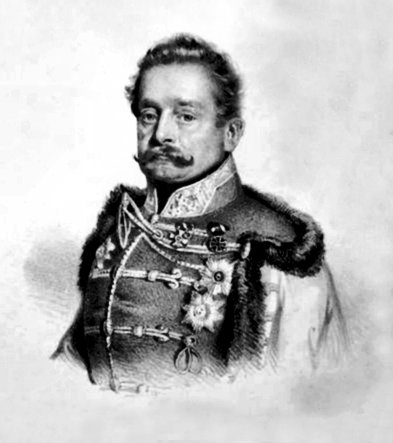 Karl Ritter Gorzkowski von Gorzkow, General der Kavallerie